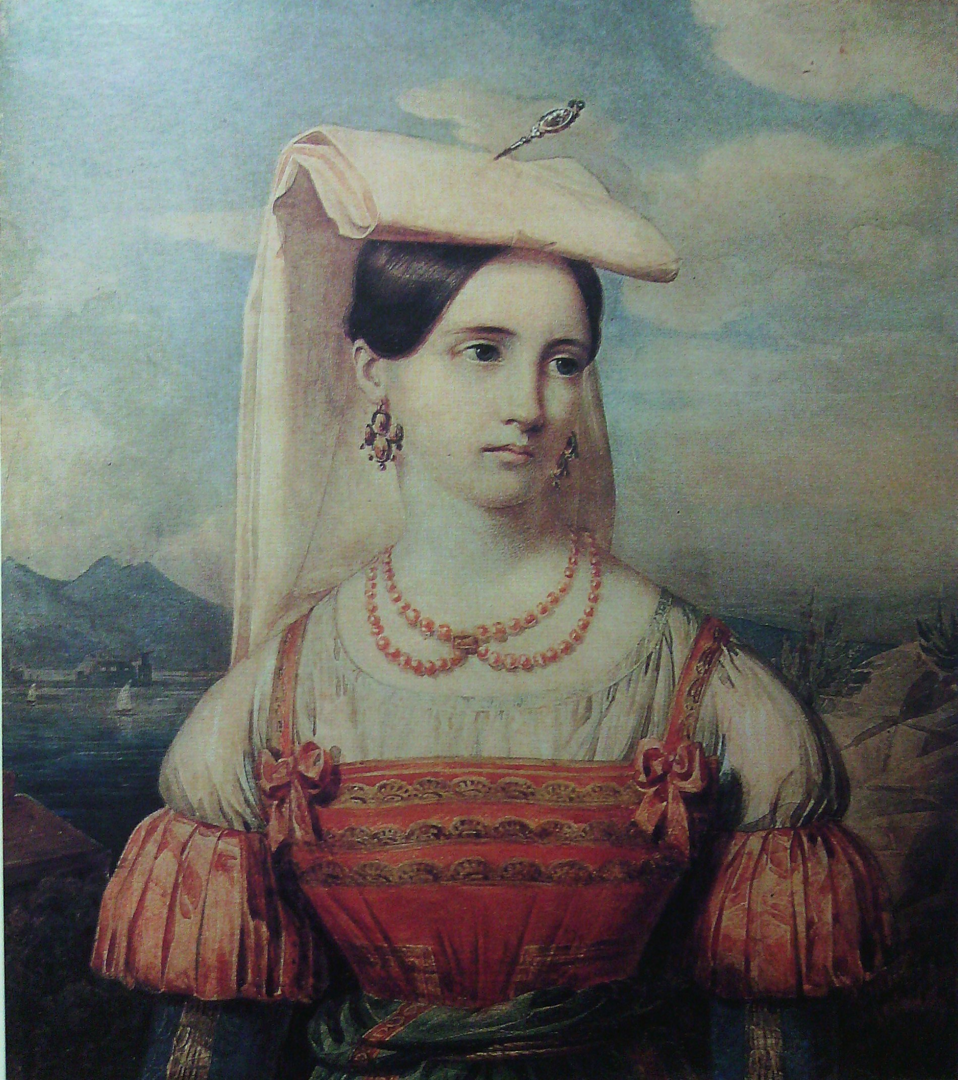 Соллогуб Софья Михайловна, ур. Виельгорская (1820-1878), дочь графа Виельгорского М.Ю. (1788-1866), жена писателя В.А.Соллогуба.